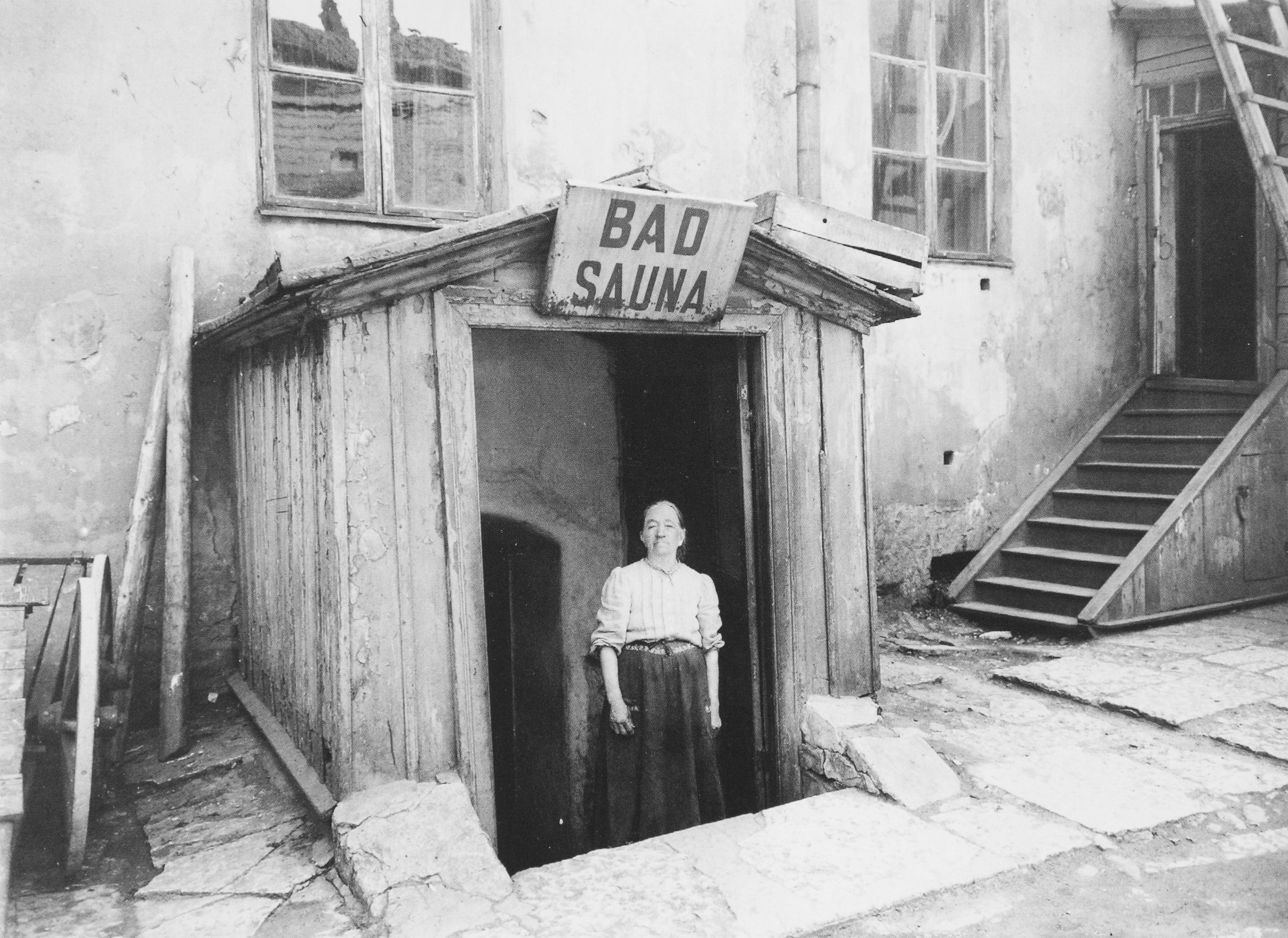 Mariansaunan kylvettäjä saunan yleisen osaston ovella vuonna 1913.